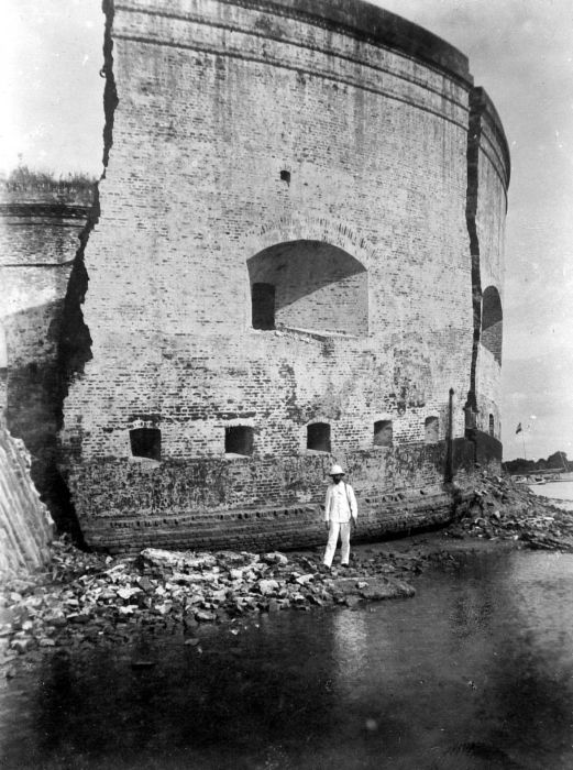 Repronegatief. Ruïne van een oud-Hollands fort op P. Kélòr, één van de Duizend Eilanden